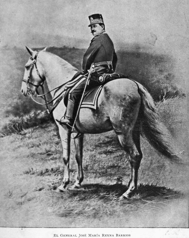 Primera fotografía instantánea elaborada en Guatemala el 28 de junio de 1896 por el fotógrafo Alberto G. Valdeavellano. Muestra al presidente de Guatemala José María Reyna Barrios.